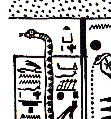 Tête du serpent Teka-her, gardien de la 4e Heure de la nuit d'après le "Livre des portes" - Nouvel Empire égyptien